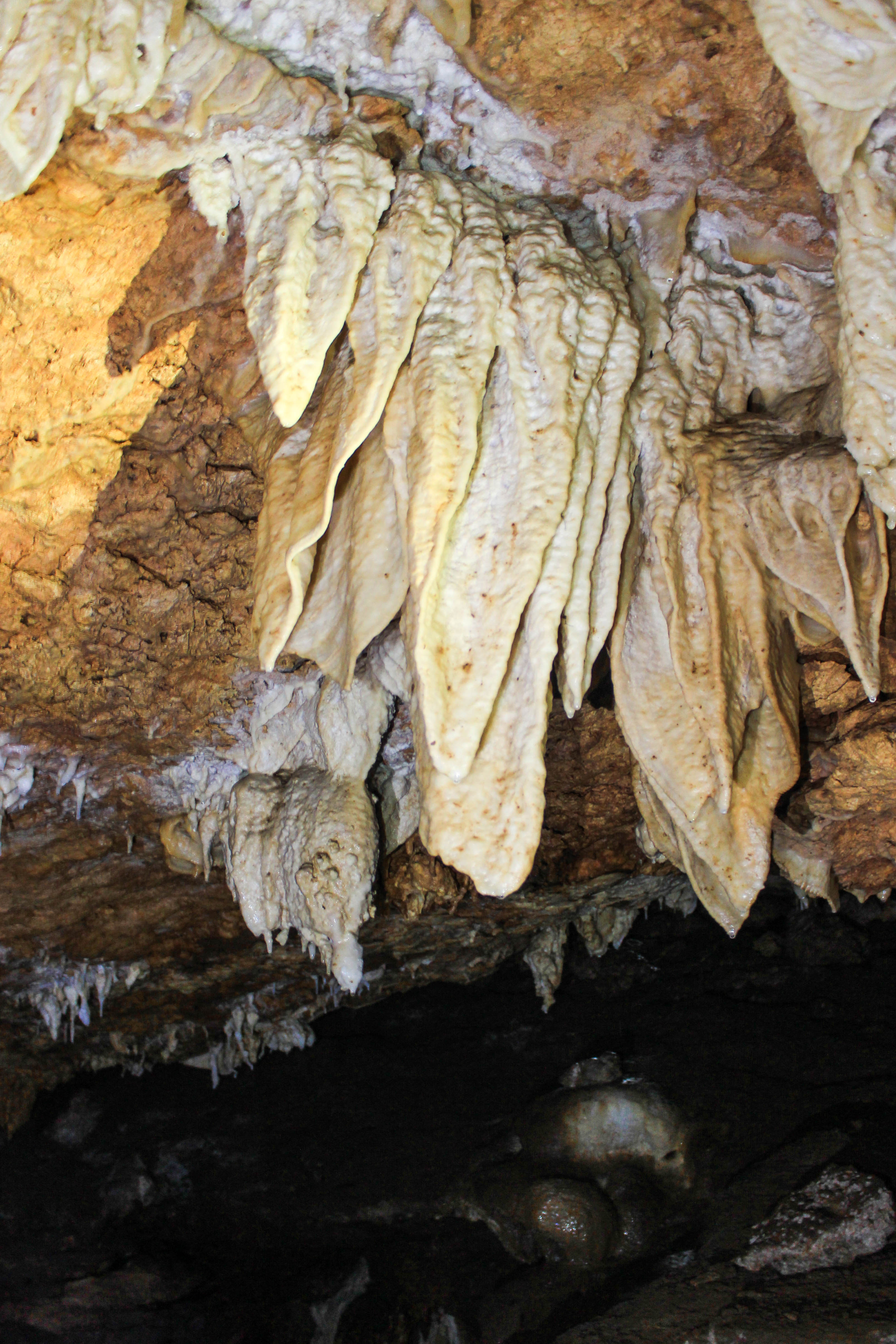 Sebuah stalaktit di goa yang belum mempunyai nama di kecamatan Donorojo, Pacitan. sesuai dengan julukannya sebagai 'Kota 1001 goa', kabupaten Pacitan menyimpan potensi keindahan bentang alam yang berada dibawah tanah.